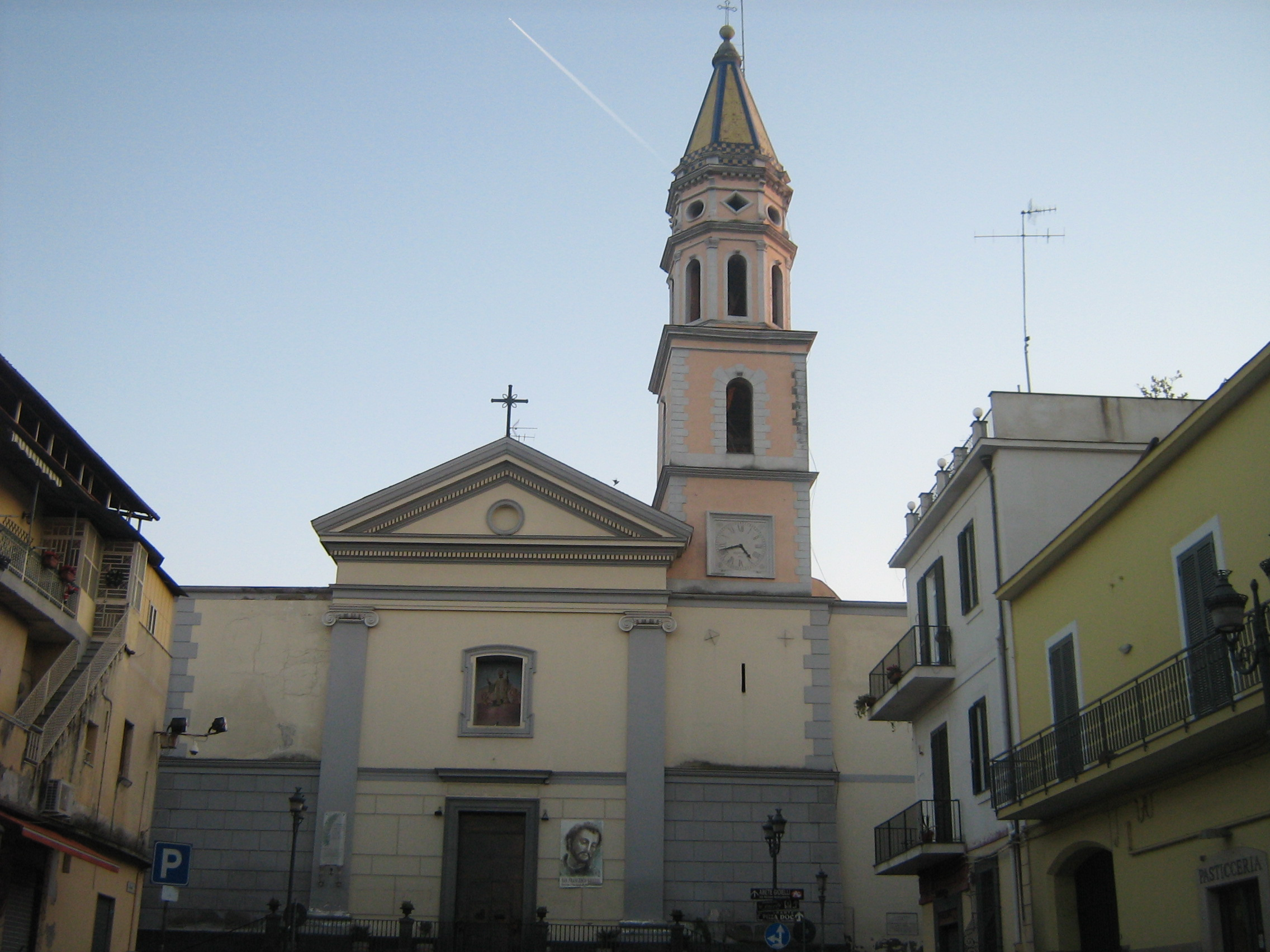 Lusb